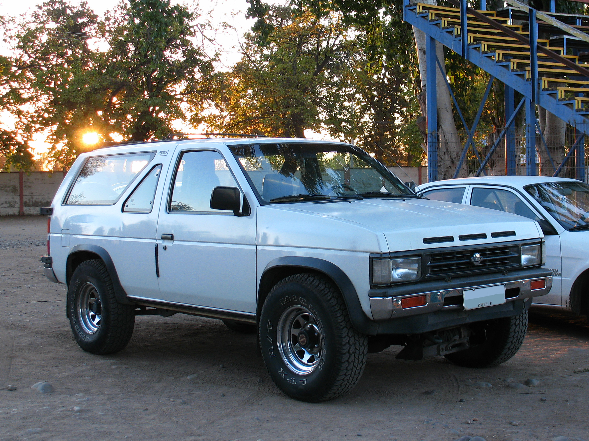 Nissan Terrano 2.4 1993